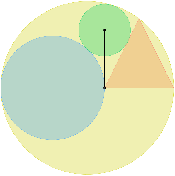 Problema sangaku con tres círculos y un triángulo Software : hecho con Geogebra 2.7.10